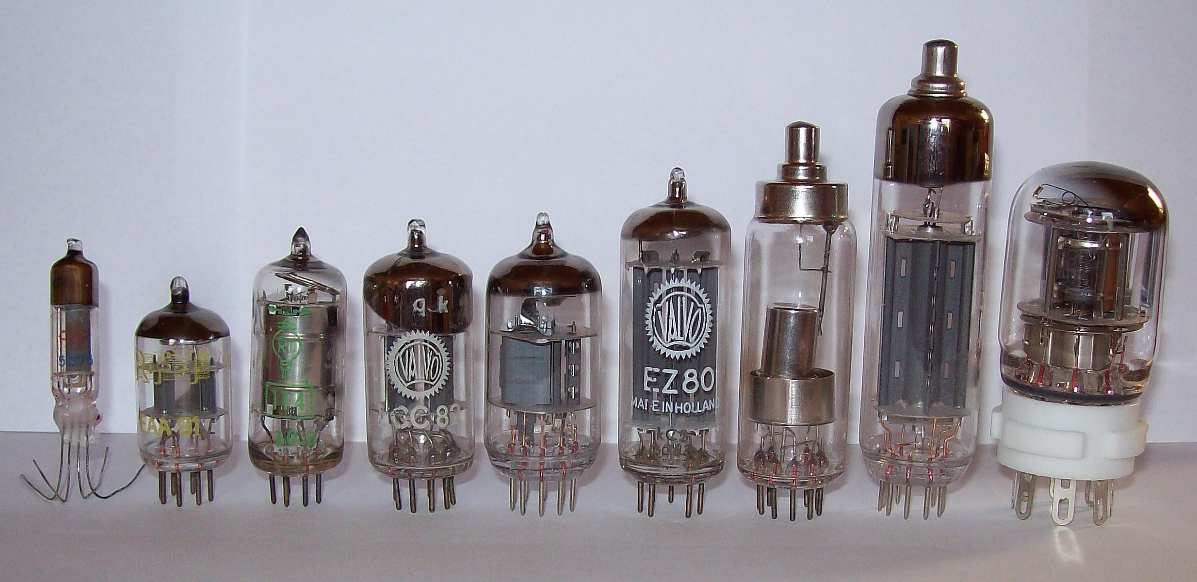 Eine Zusammenstellung von Elektronenröhren. Von links nach rechts: 5676 (Mini-Triode) EAA91 (Doppel-Diode) 1T4 / DF91 (Batterieröhren-Pentode) ECC82 (Doppel-Triode) ECF80 (Triode und Pentode in einer Röhre) EZ80 (Doppel-Netzgleichrichterdiode) Wahrscheinlich DY86 (Hochspannungsdiode) EY88 (Leistungsdiode) 2SH27L in einem unpassenden Sockel (Russische Pentode)